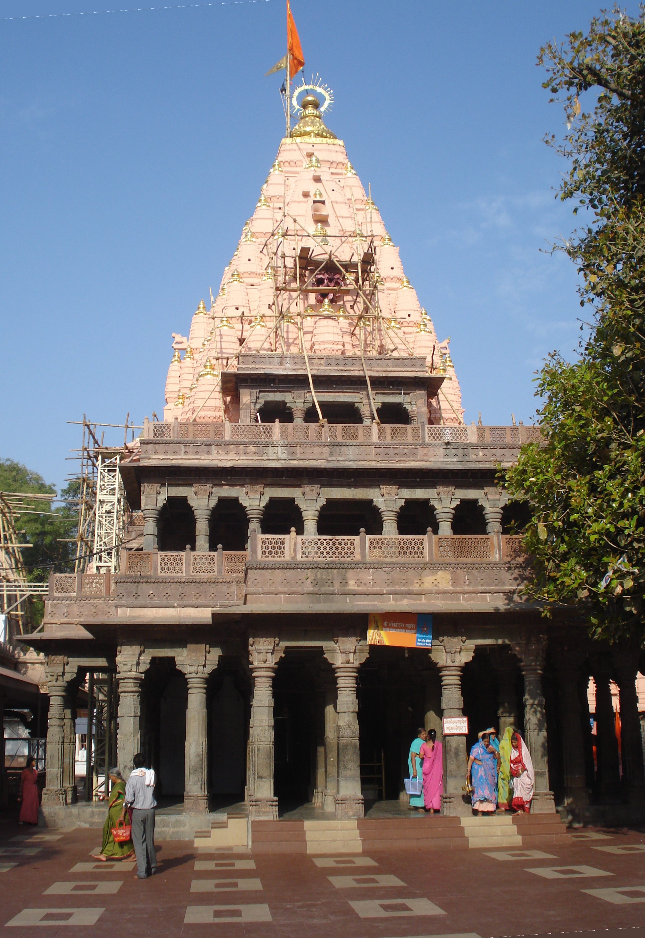 Mahakal Temple Ujjain at Ujjain Madhya Pradesh, India